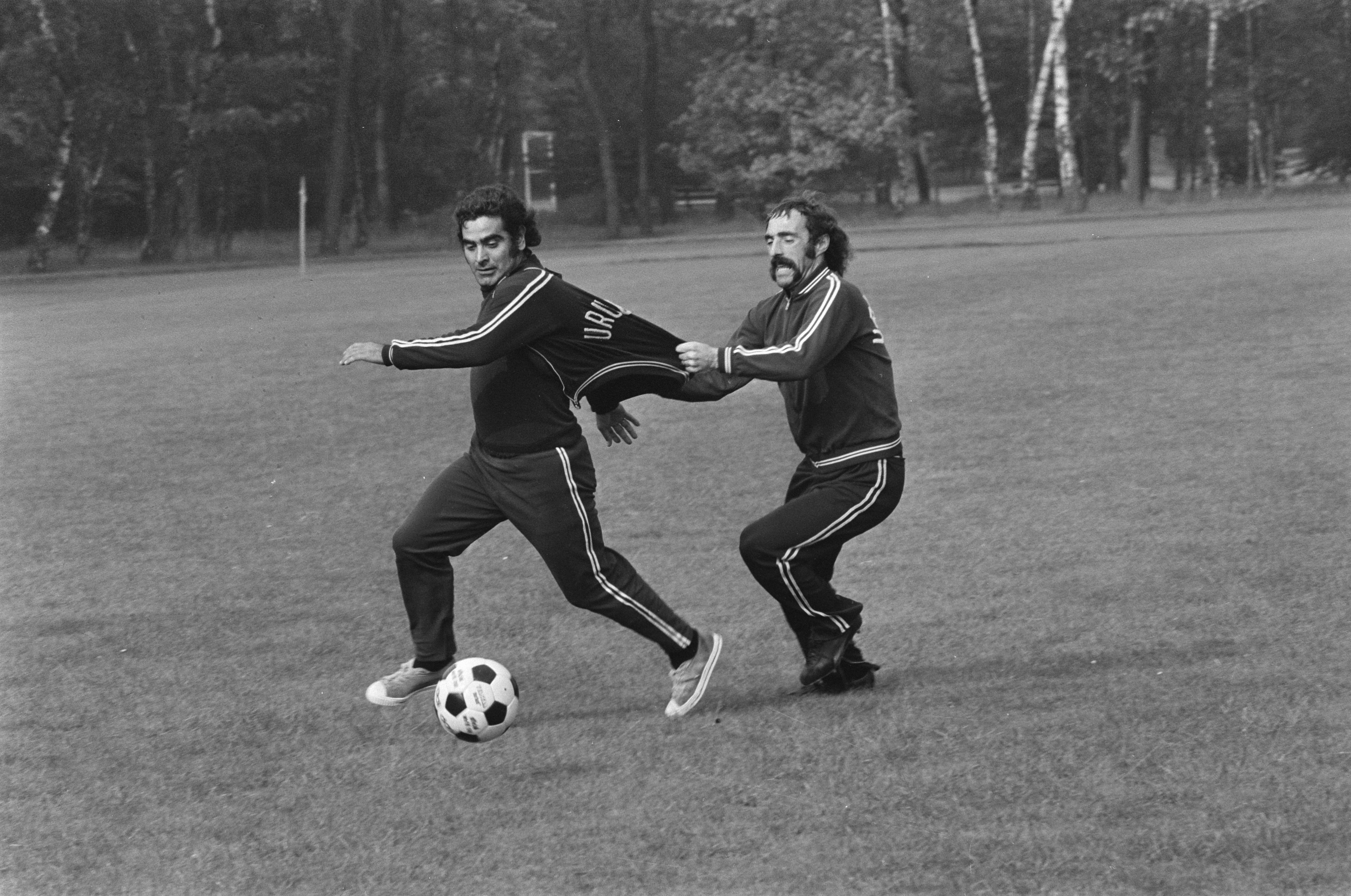 Collectie / Archief : Fotocollectie Anefo Reportage / Serie : [ onbekend ] Beschrijving : WK 74; training Uruguay in Duitsburg, Pavoni (rechts) houdt Cubilla vast tijdens training Datum : 10 juni 1974 Locatie : Duisburg Trefwoorden : sport, voetbal Fotograaf : Mieremet, Rob / Anefo Auteursrechthebbende : Nationaal Archief Materiaalsoort : Negatief (zwart/wit) Nummer archiefinventaris : bekijk toegang 2.24.01.05 Bestanddeelnummer : 927-2465